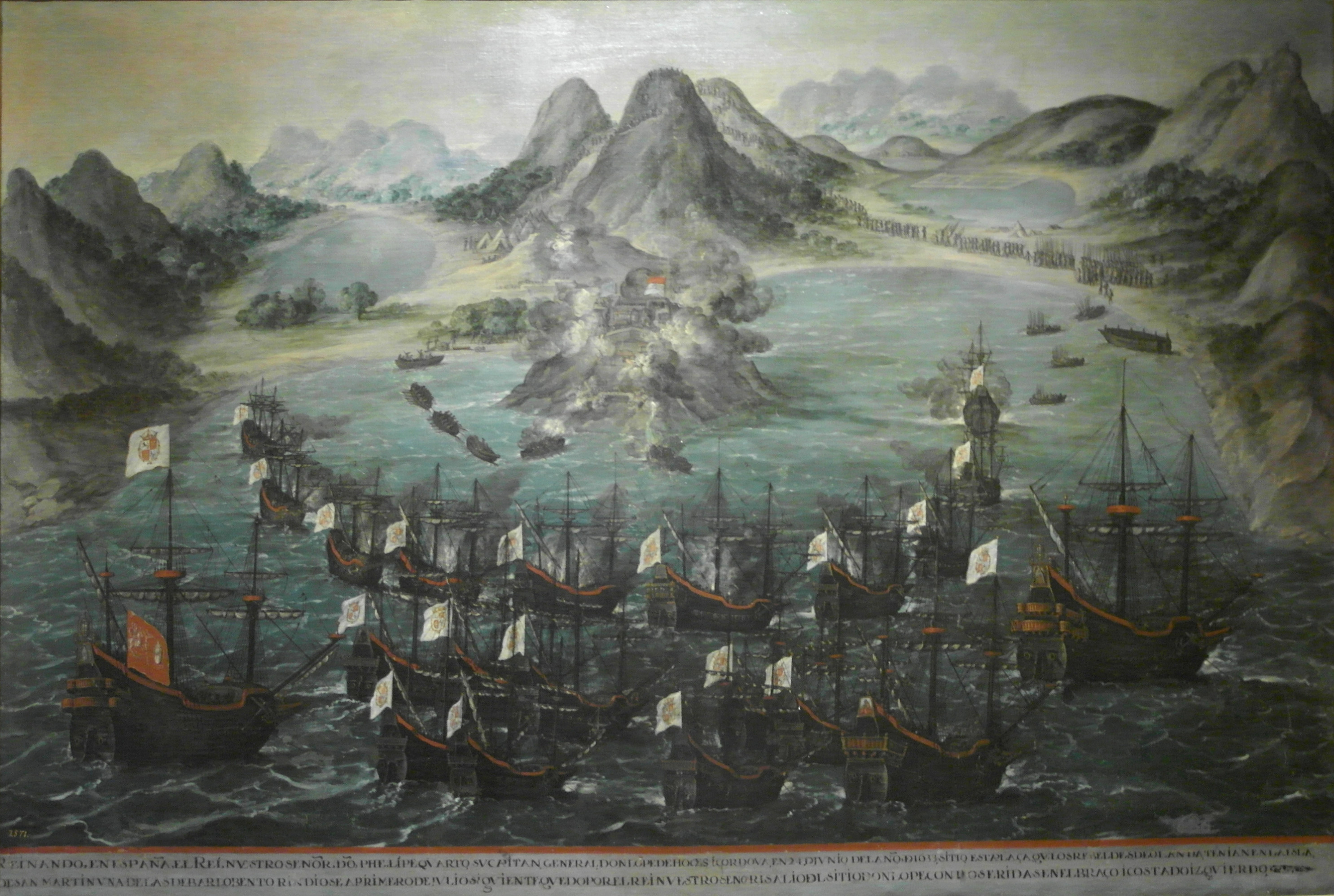 El cuadro representa la expulsión de los soldados holandeses de la isla de San Martín, (Islas de Barlovento, 1 de julio de 1633).